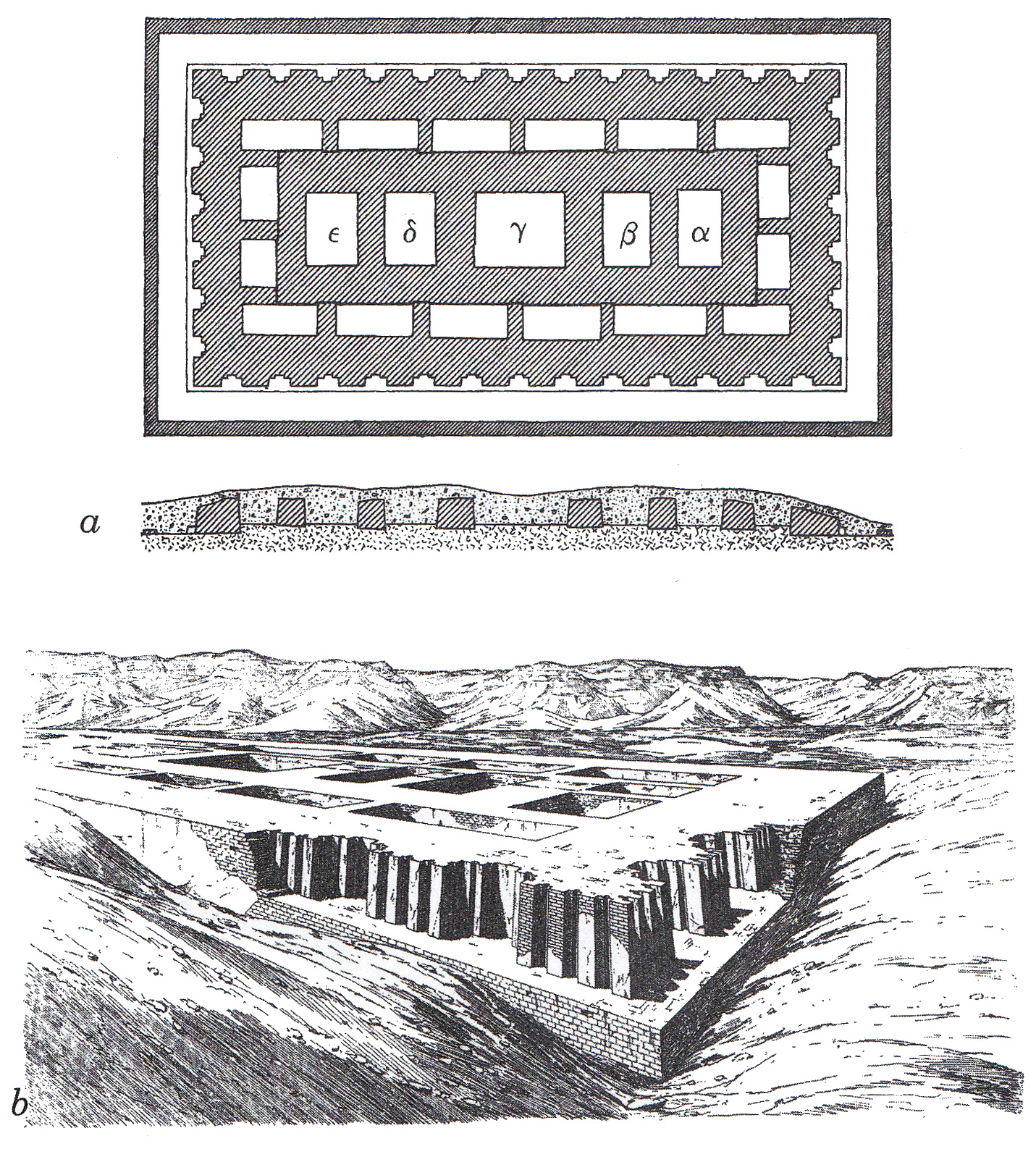 Tombe de Nagada (Egypte)